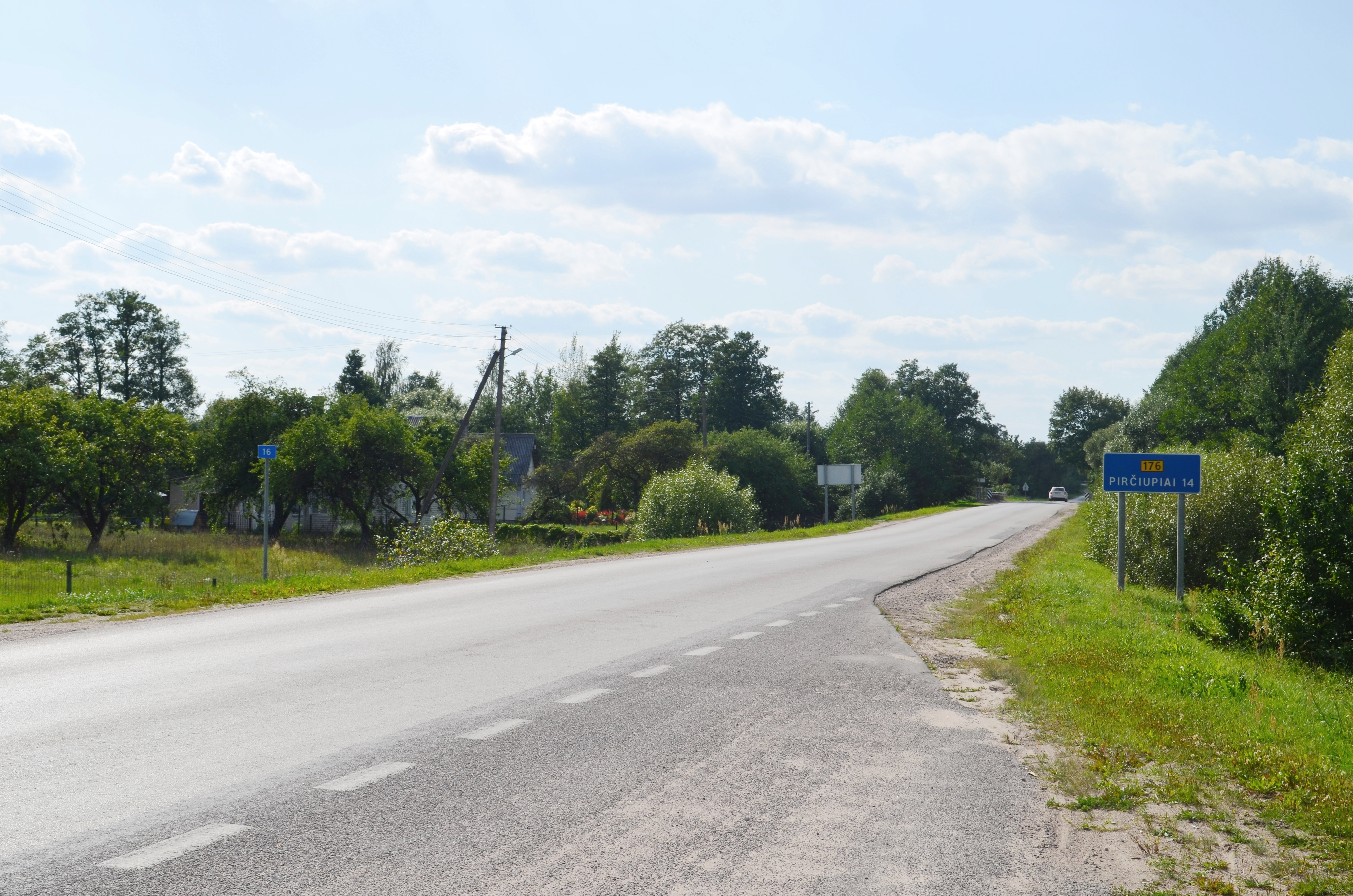 Žagarinė, Šalčininkų raj.